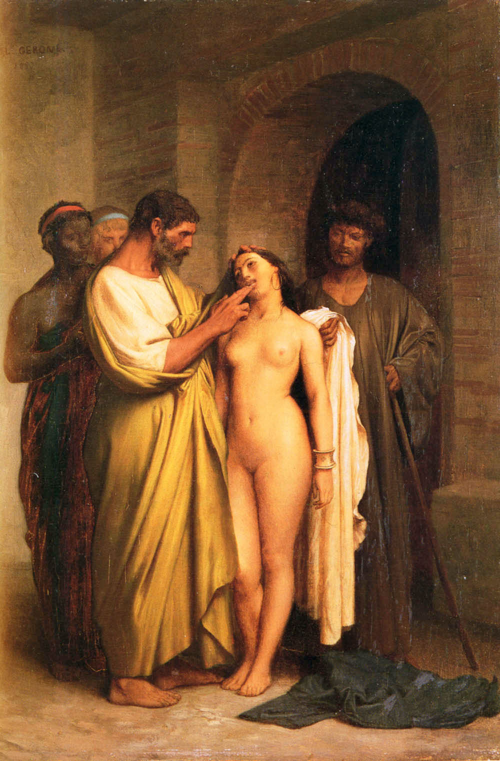 Achat d'une esclavetitle QS:P1476,fr:"Achat d'une esclave" label QS:Lfr,"Achat d'une esclave"